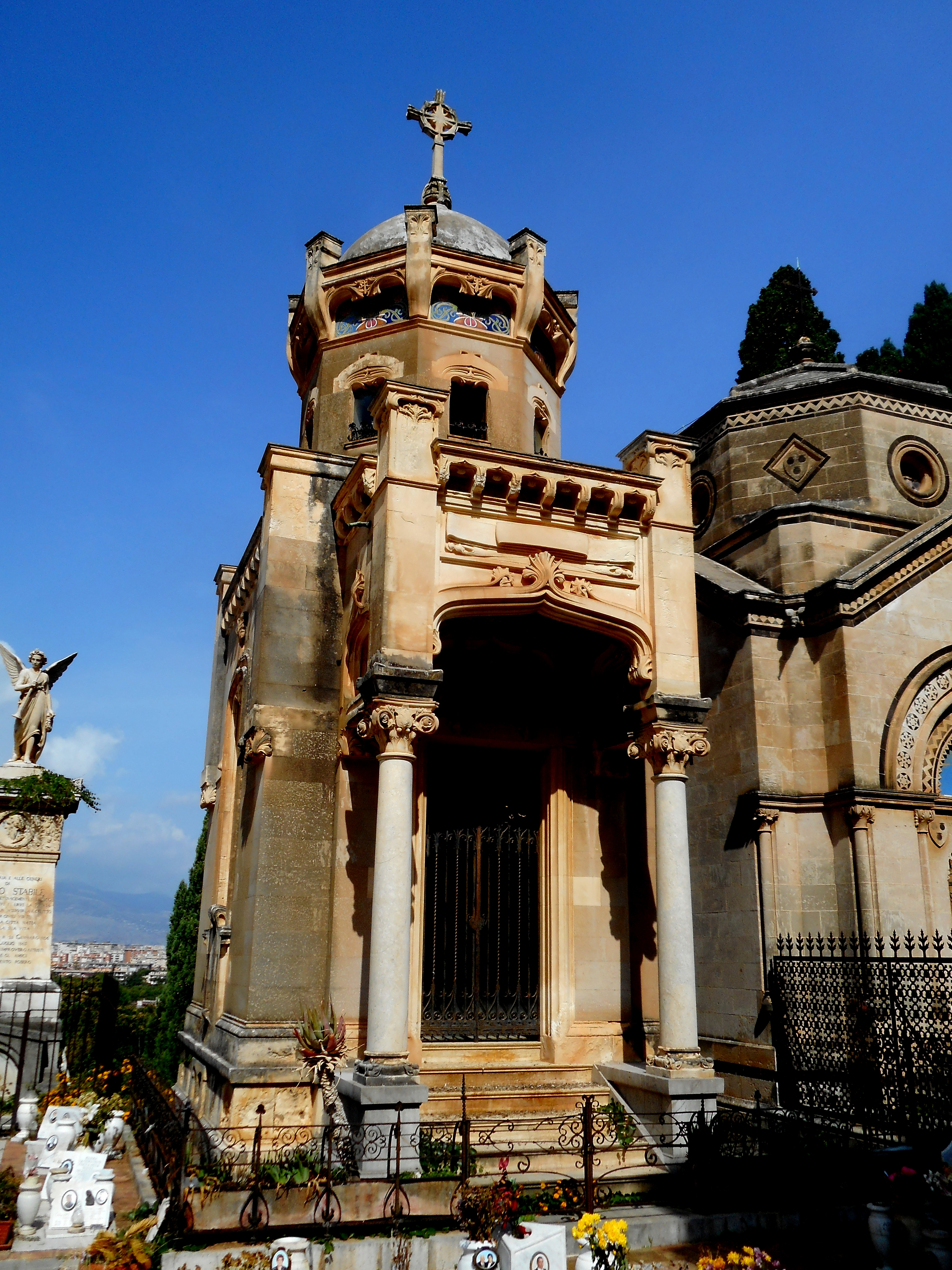 Cappella Lanza di Scalea nel cimitero di Santa Maria di Gesù, opera dell'architetto Ernesto Basile